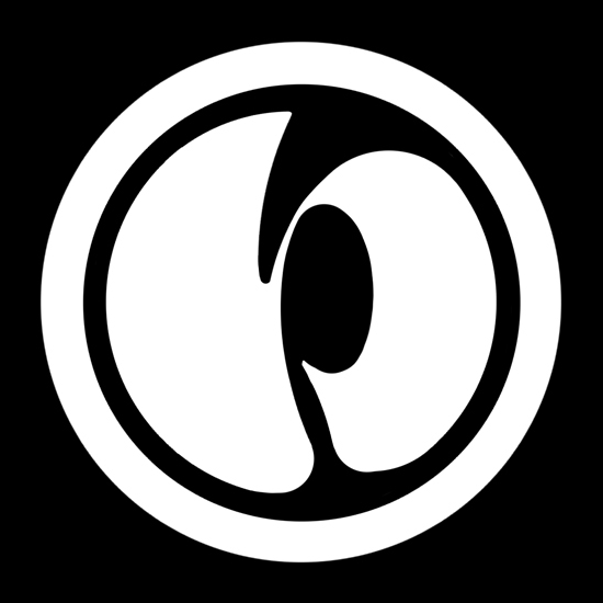 「丸にいの字」紋（染抜）